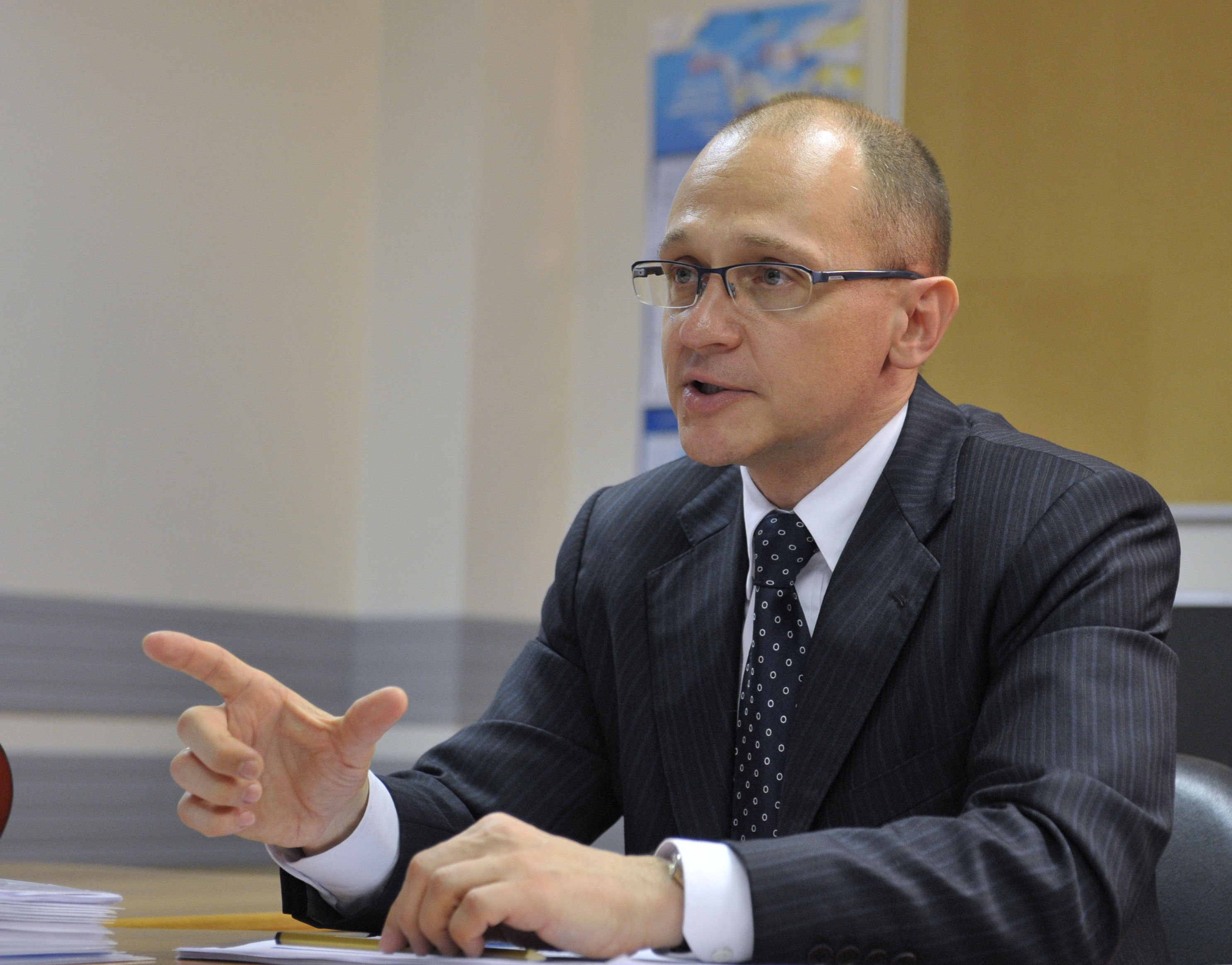 Руководитель государственной корпорации «Росатом» С.В.Кириенко на встрече с Председателем Правительства Российской Федерации В.В.Путиным